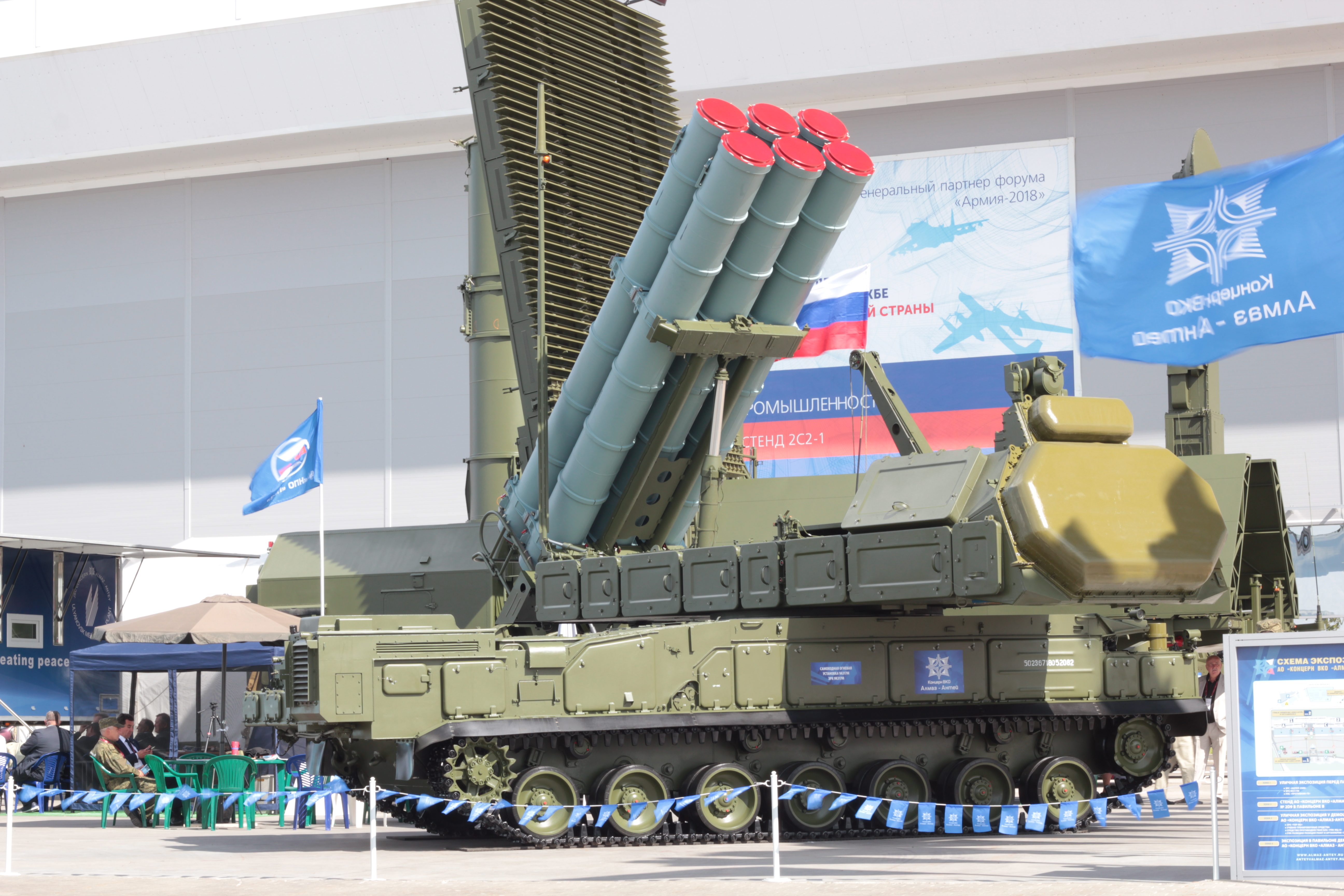 Самоходная огневая установка (СОУ) 9А317М ЗРК 9K317M «Бук-M3».